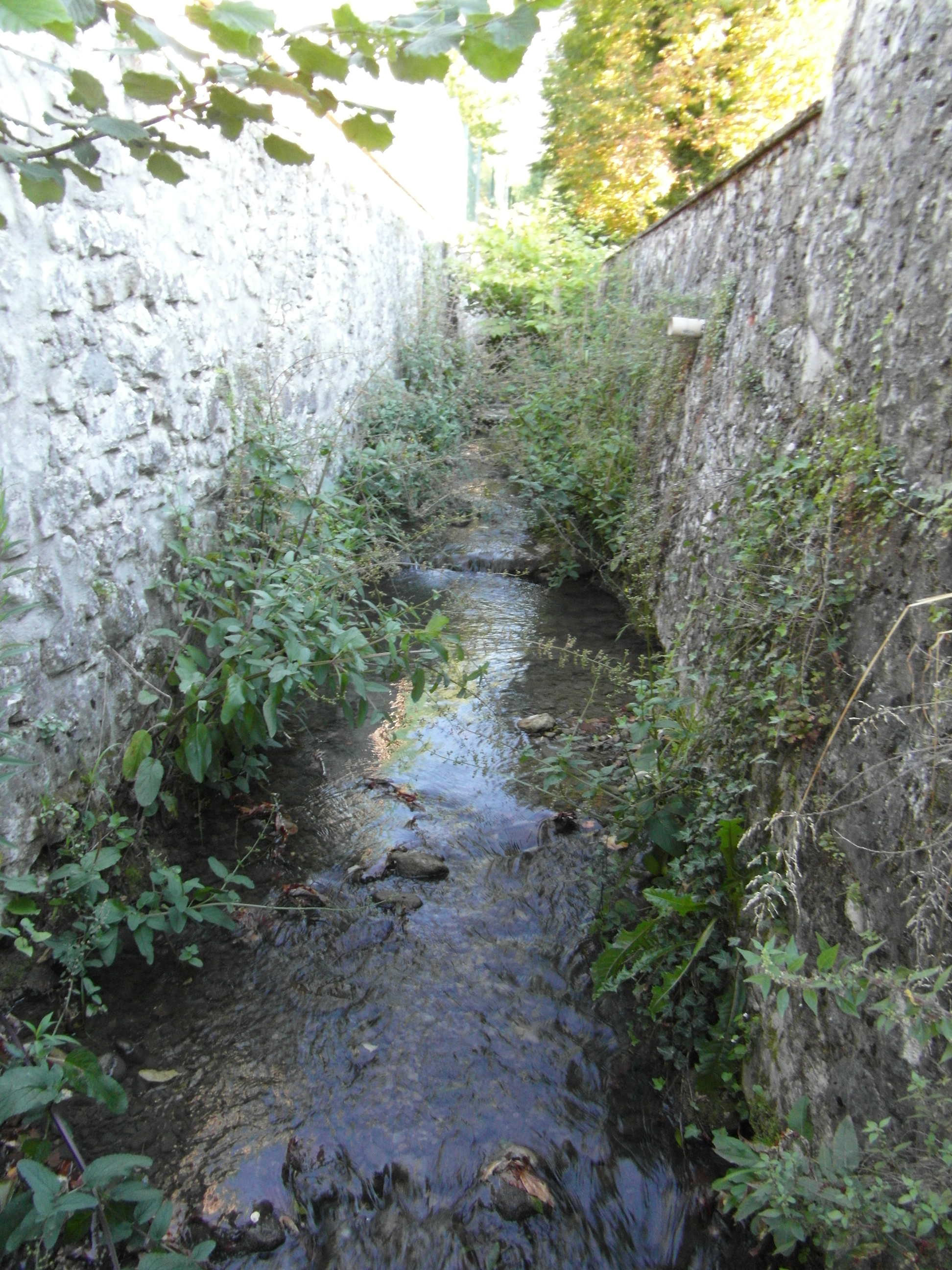 Le ruisseau du Charmeyran sur le territoire de la commune de La Tronche (38)